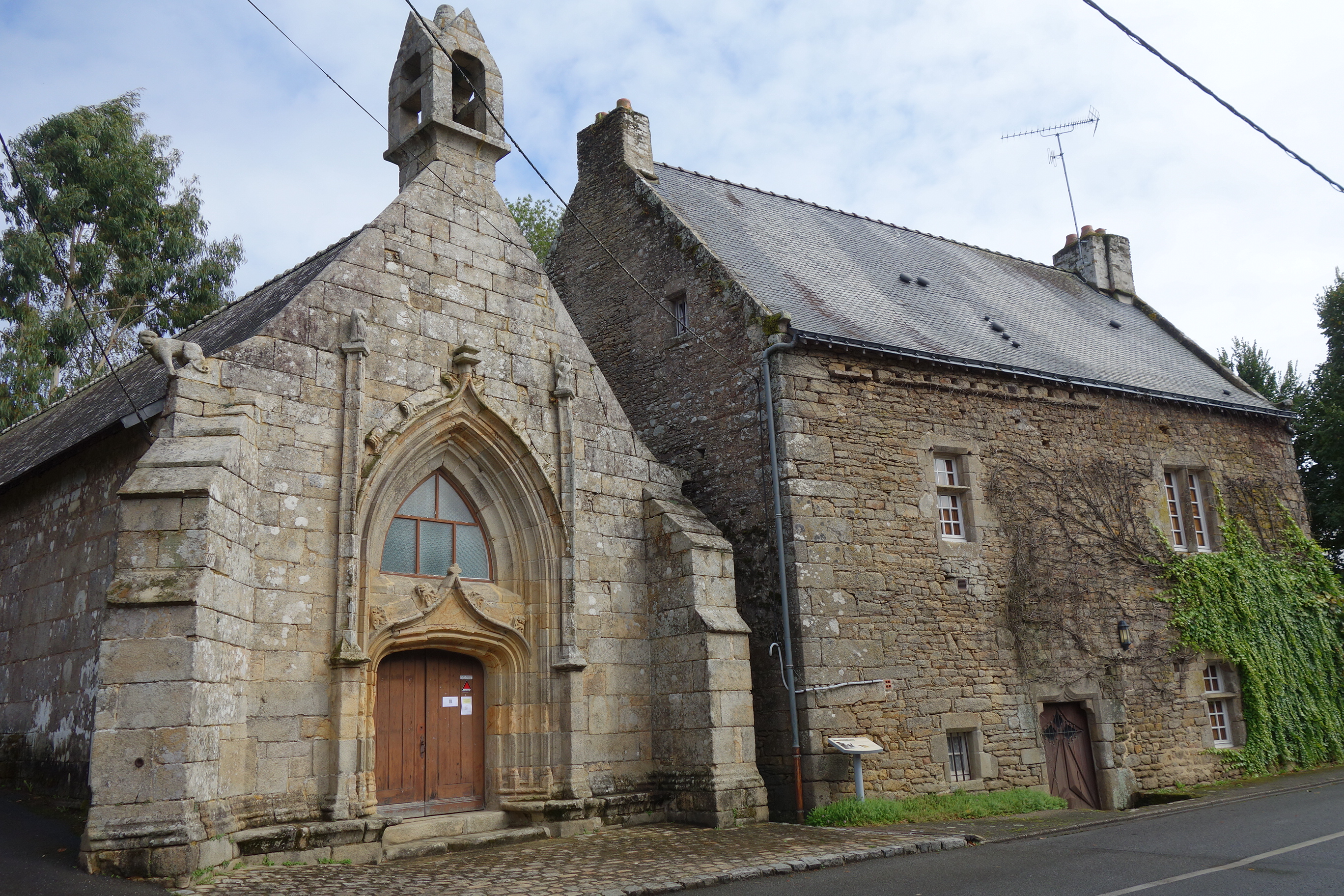 Prieuré de Saint-Cado, le Reclus, à Auray